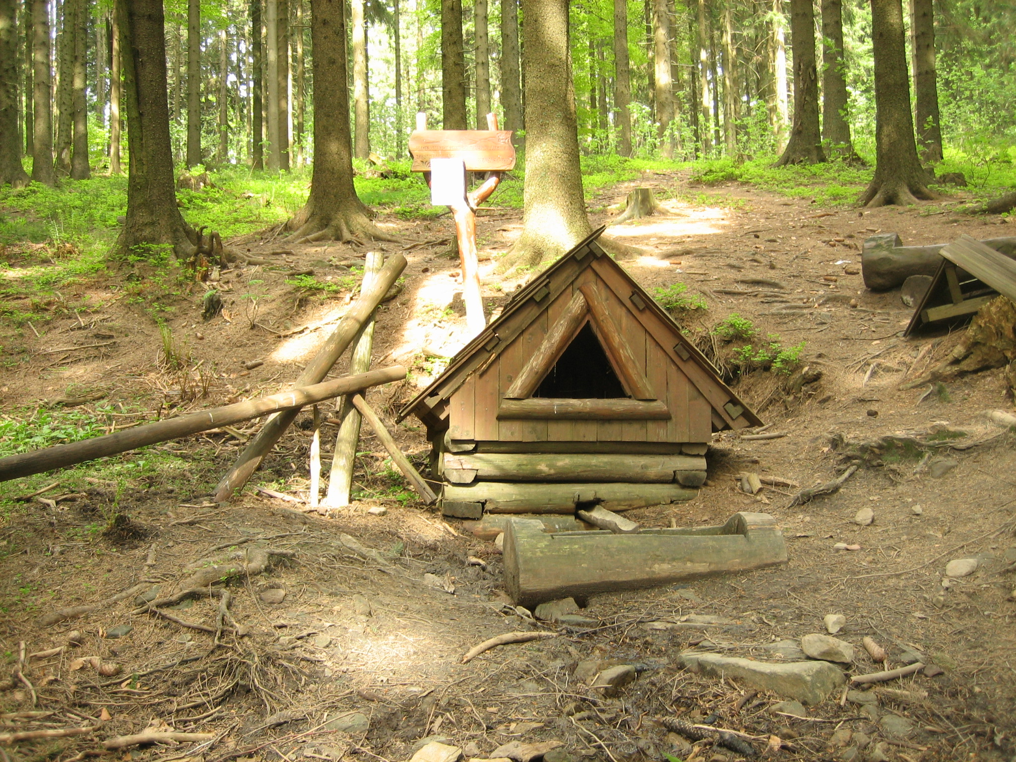 Pramen Vsetínské Bečvy pod Trojačkou